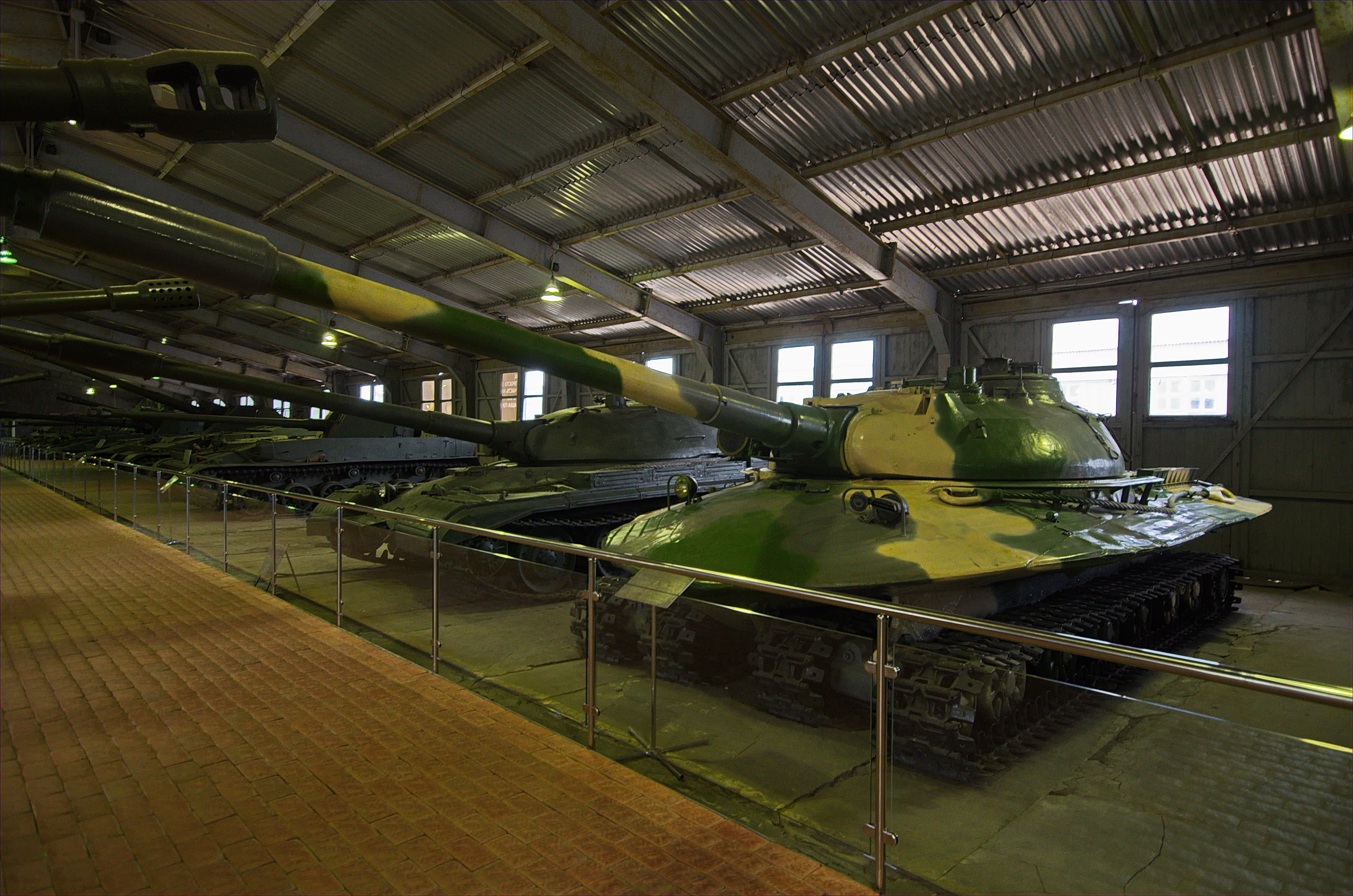 0752 - Moskau 2015 - Panzermuseum Kubinka